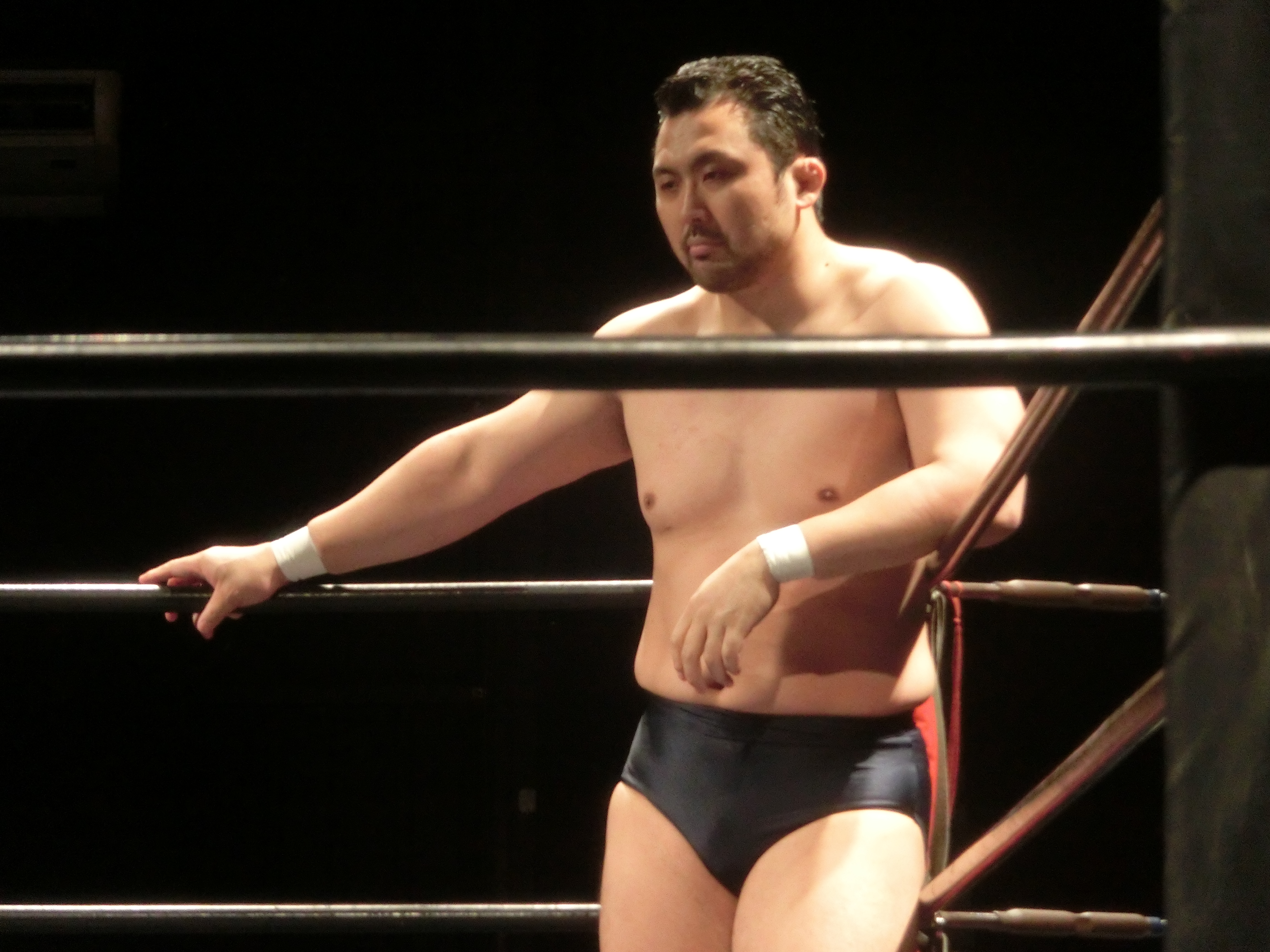 ハードヒット2019年6月8日